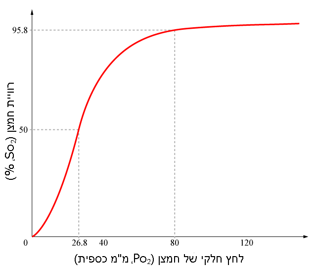 Hb saturation curve